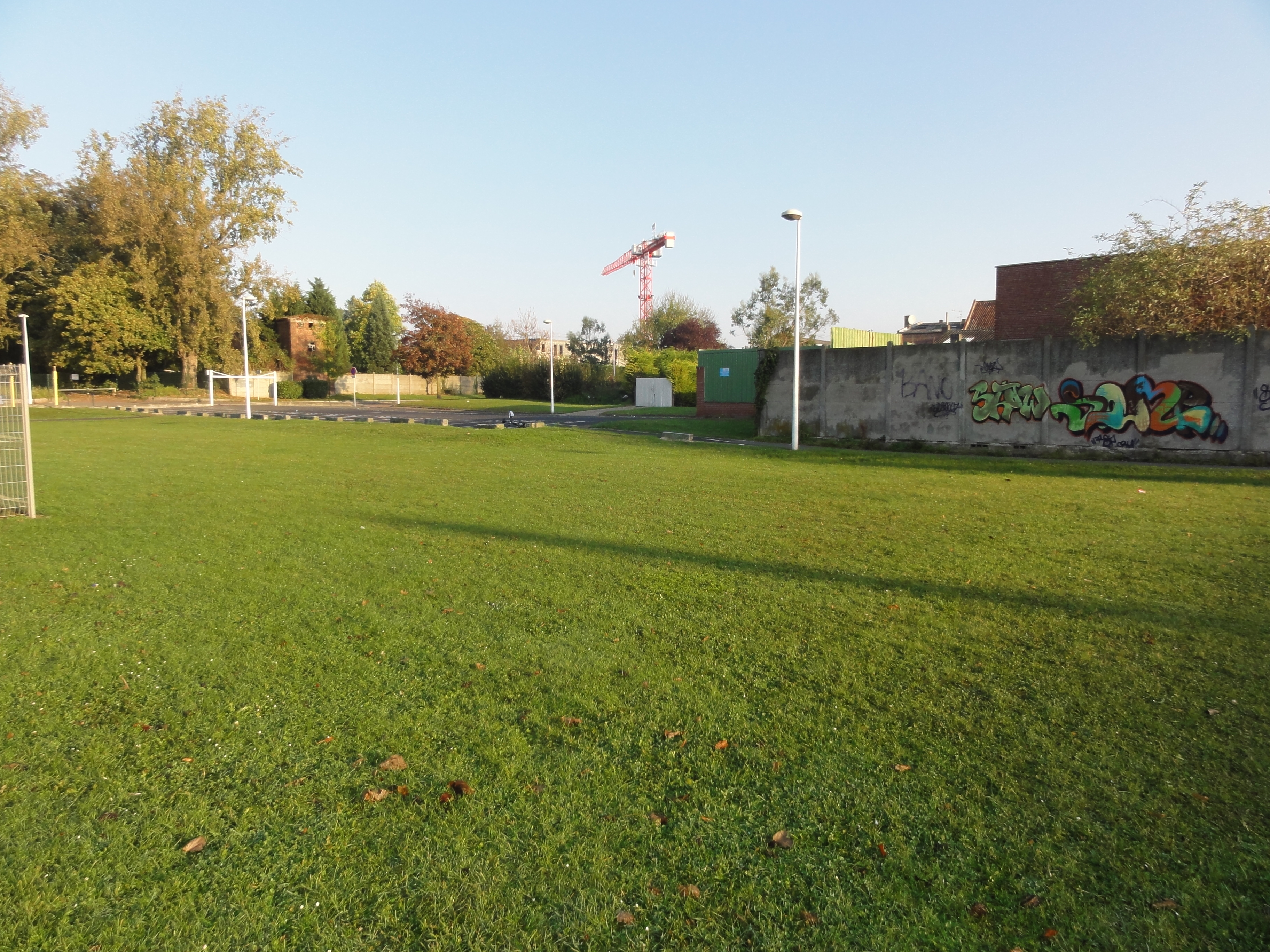 Terril n° 114A dit 13 d'Oignies Est, disparu, Fosse n° 3 de la Compagnie des mines de Carvin, Carvin, Pas-de-Calais, Nord-Pas-de-Calais, France.